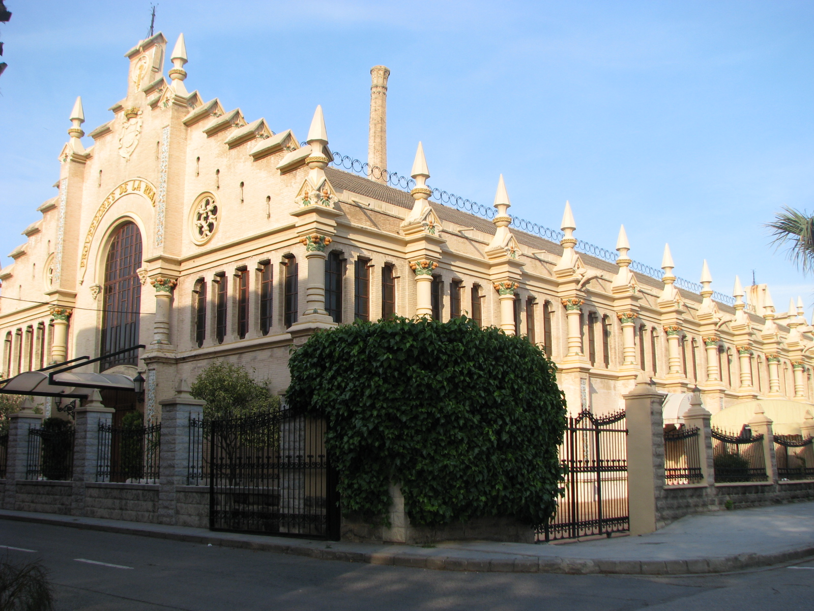 Almacén de los hermanos Pérez Puig, posterior fábrica de algodones.